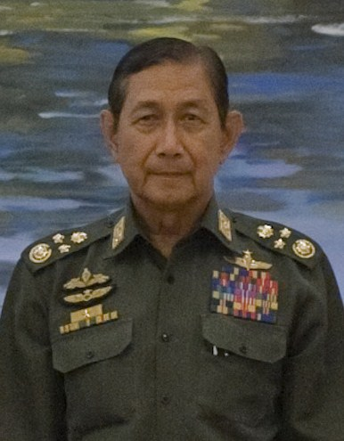 นายกรัฐมนตรีเยี่ยมคารวะพลเอกอาวุโส ตาน ฉ่วย ประธานสภาสันติภาพและการพัฒนาแห่งรัฐ (State Peace and Development Council of the Union of Myanmar - SPDC) ณ เรือนรับรอง Zeyarthiri Beikman นครเนปิดอว์ สหภาพพม่า วันจันทร์ ที่ 11 ตุลาคม พ.ศ.2553 (Photographer attached to the Prime Minister of the Kingdom of Thailand : Peerapat Wimolrungkarat / พีรพัฒน์ วิมลรังครัตน์)